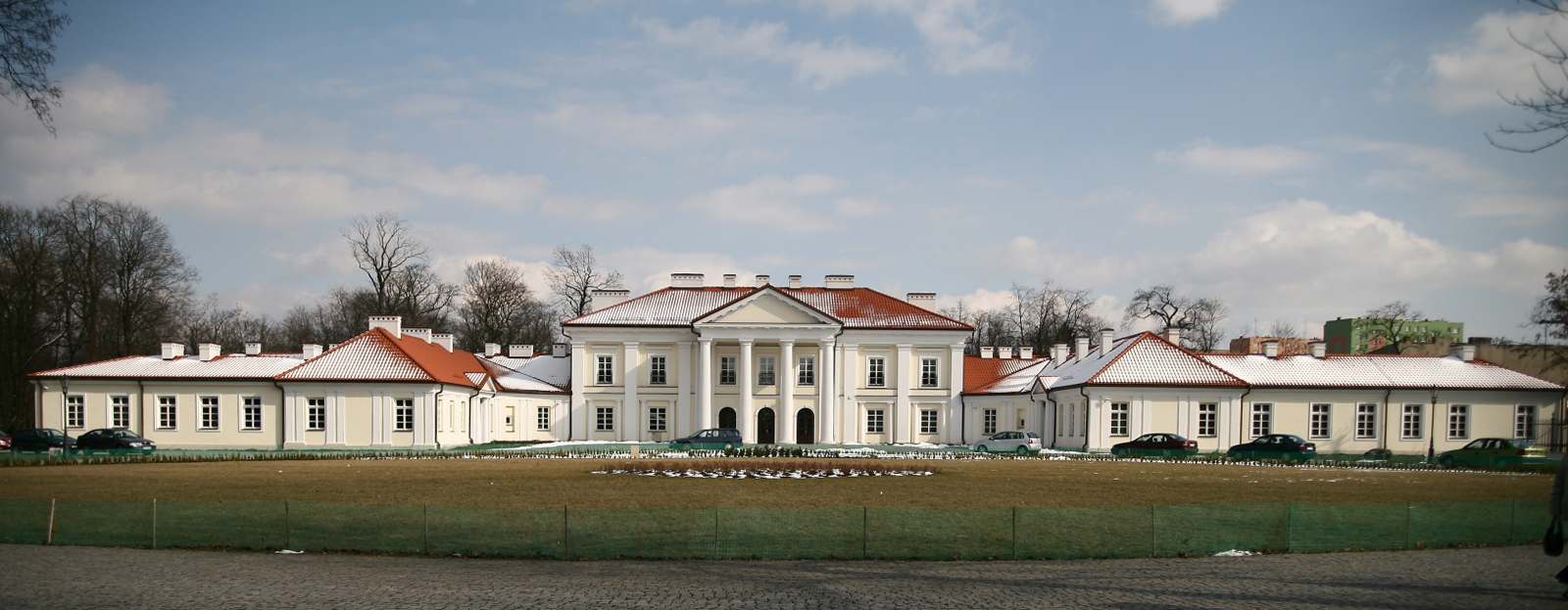 Siedlce Pałac Ogińskich, obecnie rektorat Uniwersytetu Przyrodniczo-Humanistycznego w Siedlcach